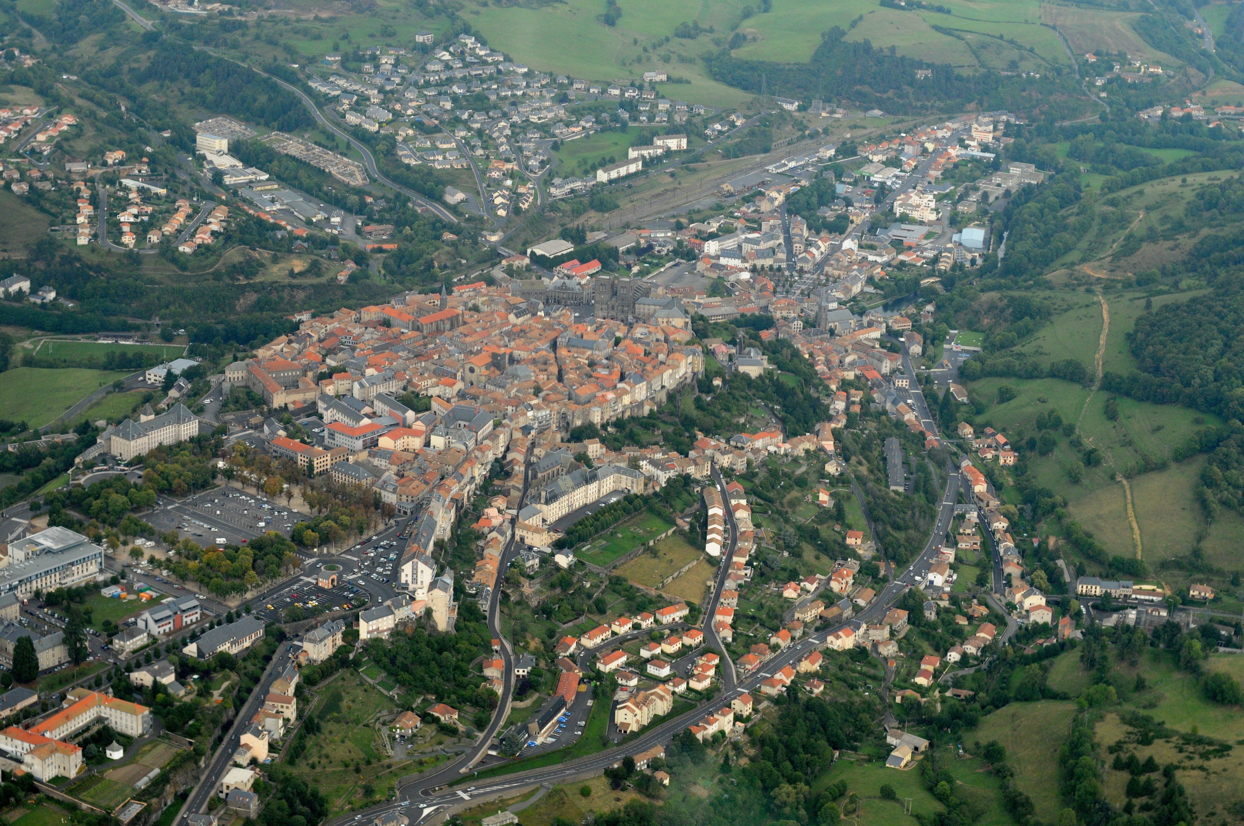 Vue aérienne de la ville de St-Flour